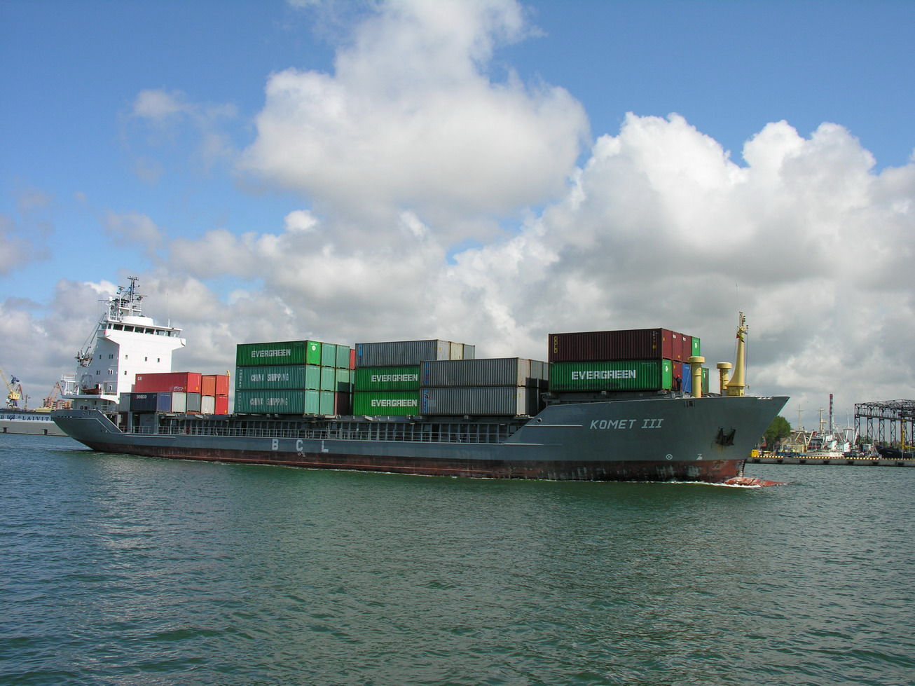 Klaipėda. Klaipėdos valstybinis jūrų uostas